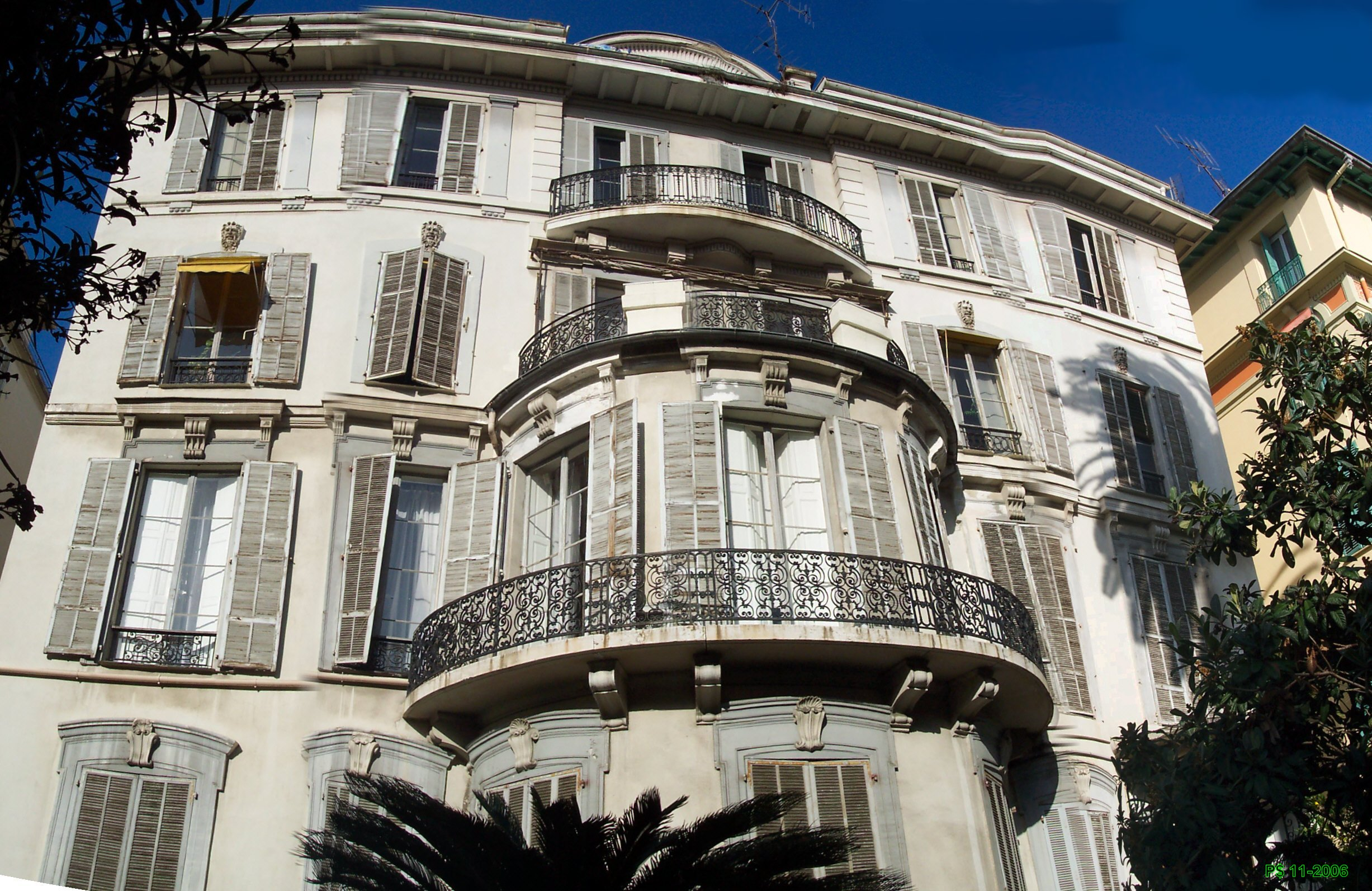 Villa Gues, 38 Rue Pastorelli. Vue générale.